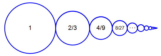 Serie geomètrica de cercles